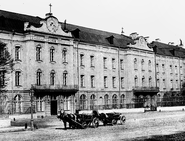 Императорский Санкт-Петербургский университет Физико-математический факультет